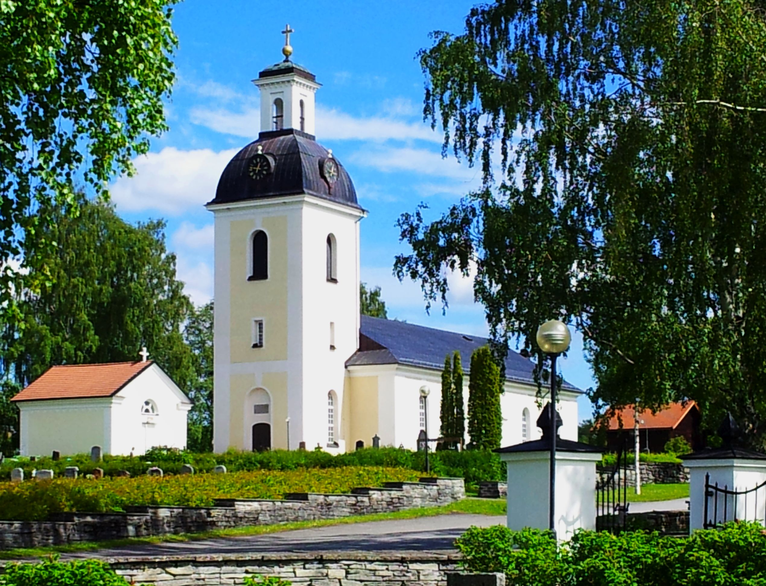 Fotograferad från sydväst, juli 2014